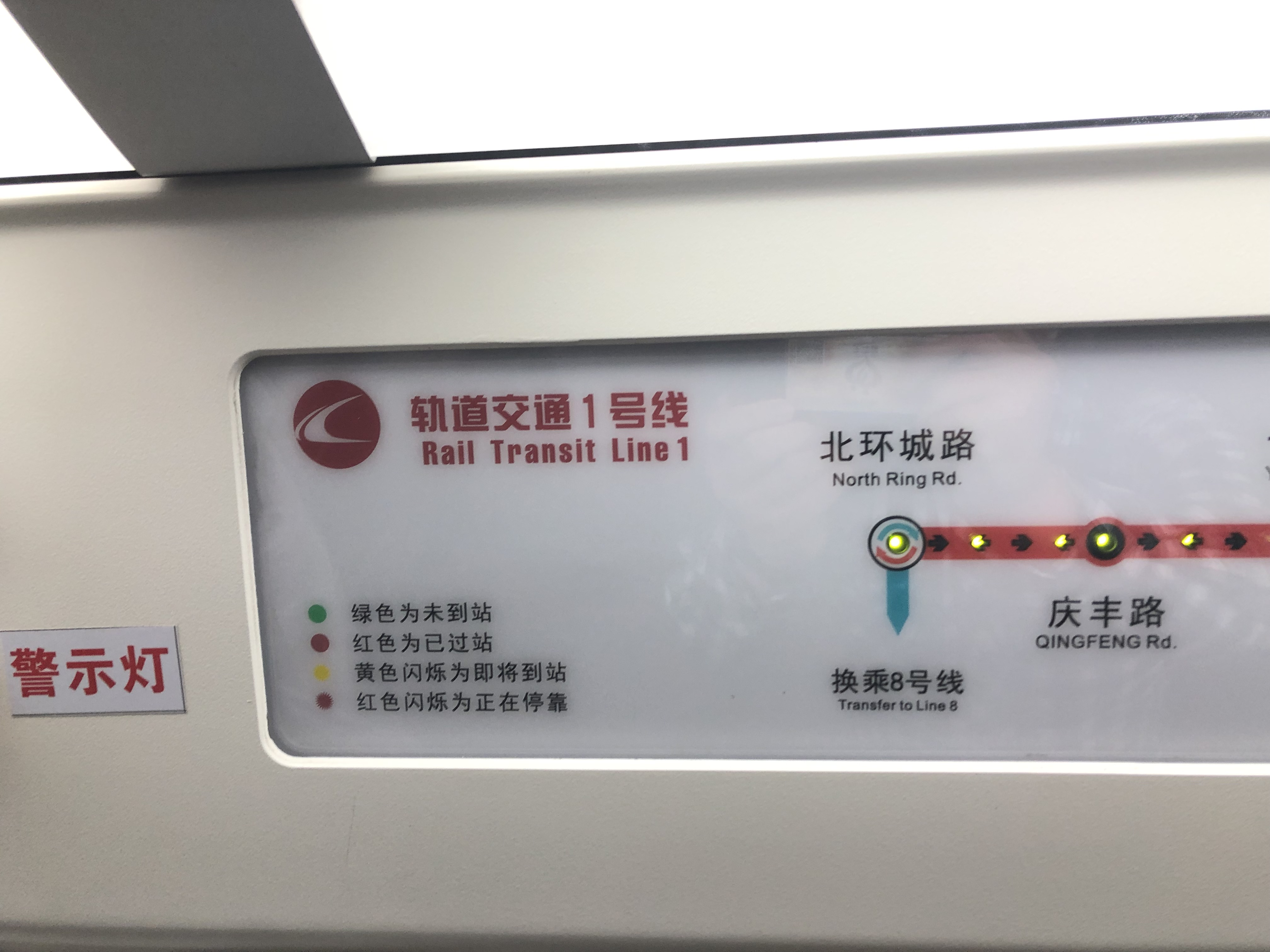 中文（中国大陆）: 新长春轨道交通一号线车内指示牌，将“地铁一号线”及其英文更改为“轨道交通一号线”及其英文。